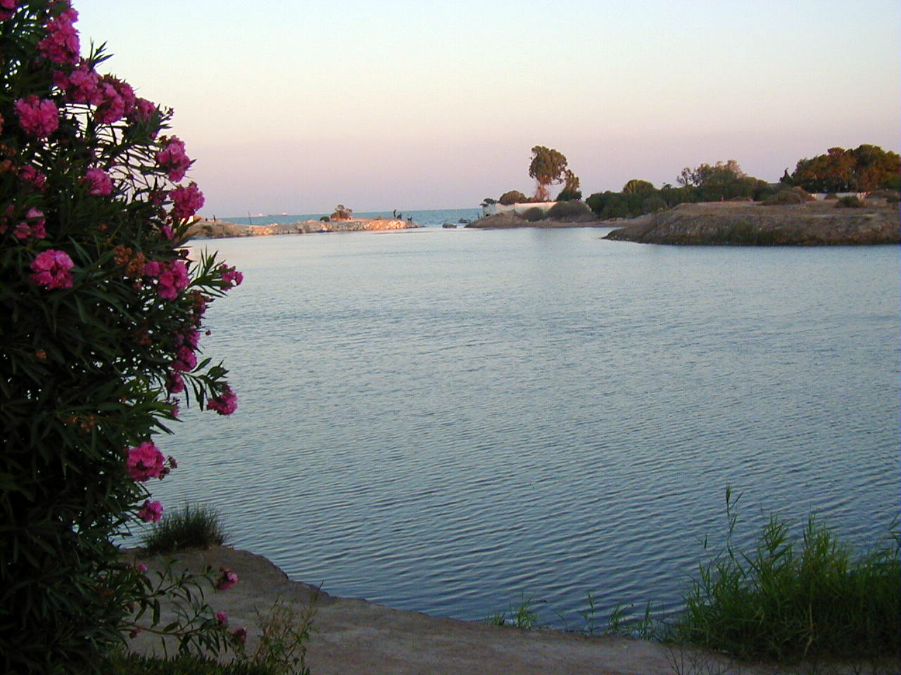 port circulaire, vue sur ilôt amirauté